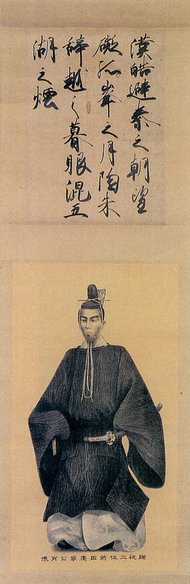 前田慶寧の肖像。